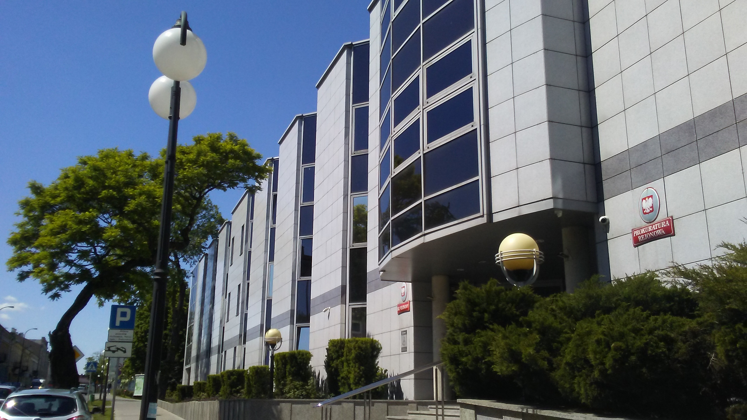 Prokuratura i sąd w Tomaszowie Mazowieckim